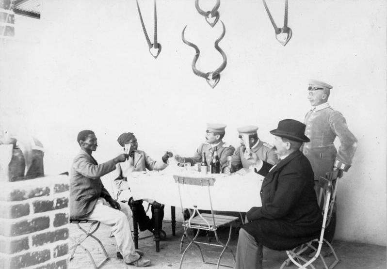 Grossmann Samuel Isaak, Kapitain Hendrik Witboi, Gouverneur L [Leutwein], Major v. Heydebeck, Bez.Amtm Daft, e Adjutant